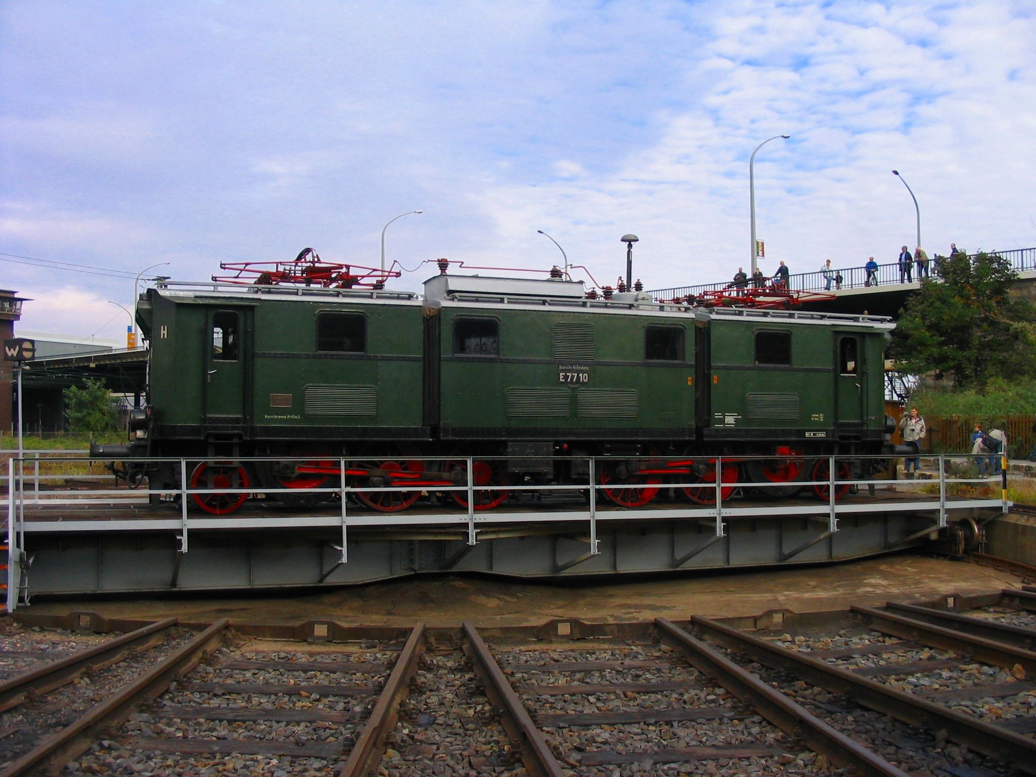 E 70 10 auf der Drehscheibe des Eisenbahnmuseums Dresden